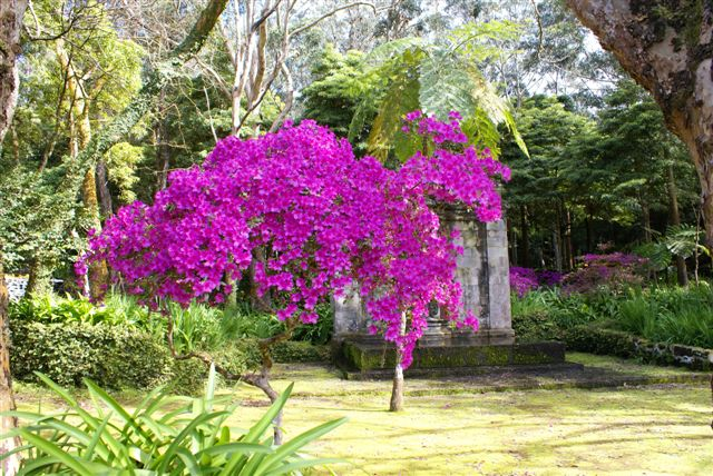 Azálea em flor, Mata da Serreta, ilha Terceira, Açores, Portugal